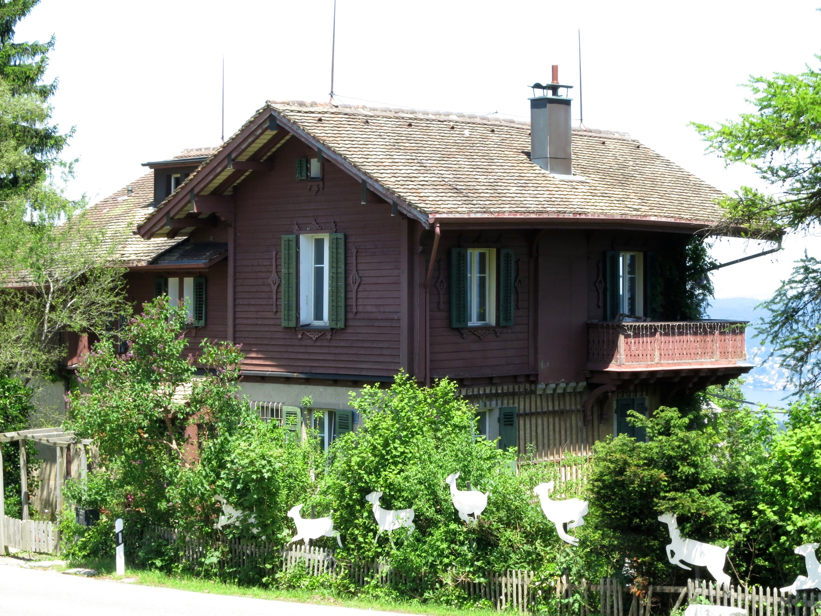 Bauernhaus, Langnau am Albis ZH, Schweiz; ehem. Wohnhaus von Nanny von Escher